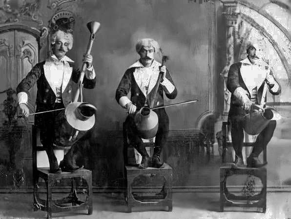 Grupo español de música, activo entre 1874 y 1899. Actuaban con instrumentos informales, interpretando fragmentos de música clásica y popular.